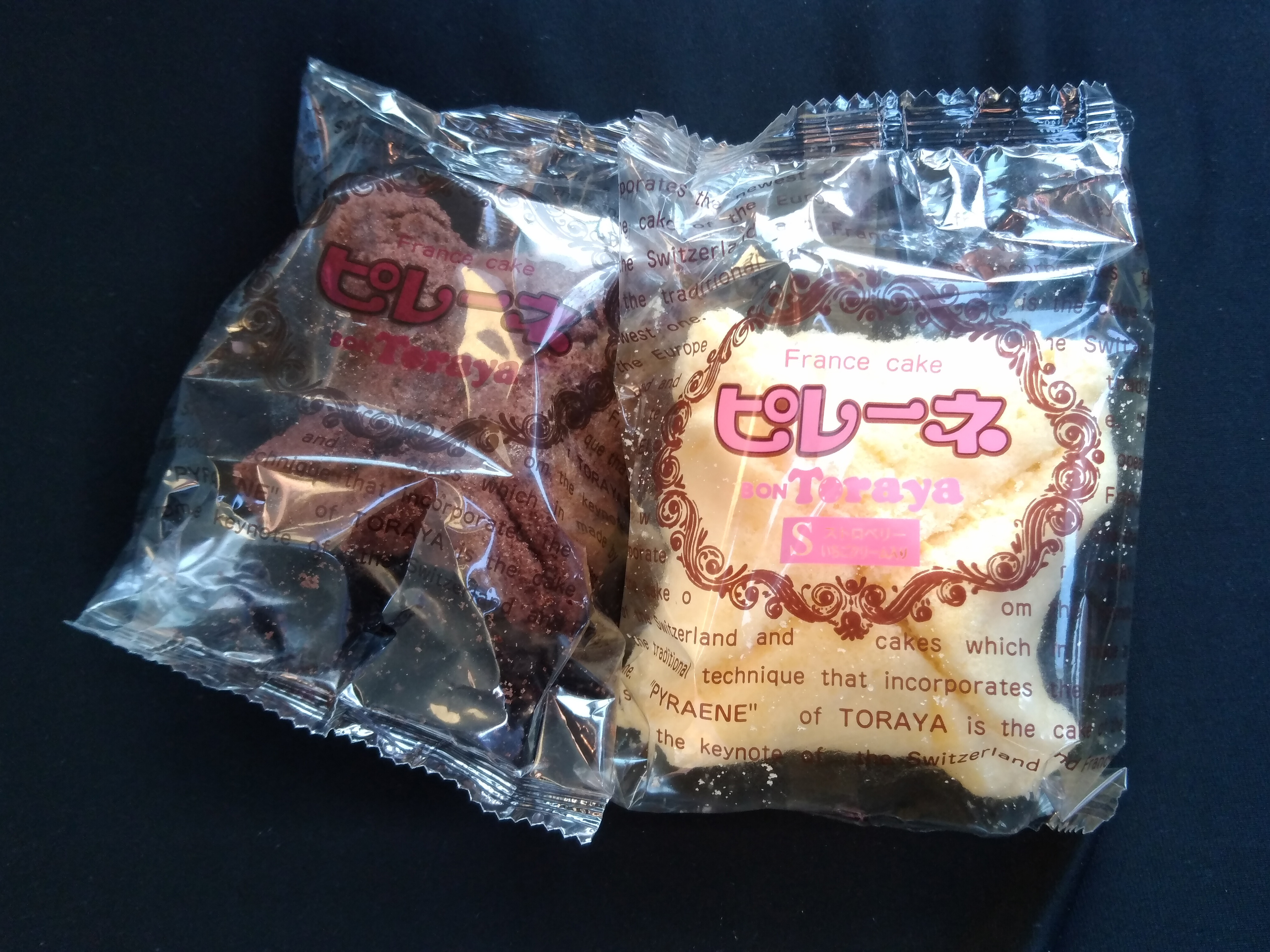 豊橋市の和洋菓子店・ボンとらやの「ピレーネ」。チョコ味とストロベリー味を撮影。